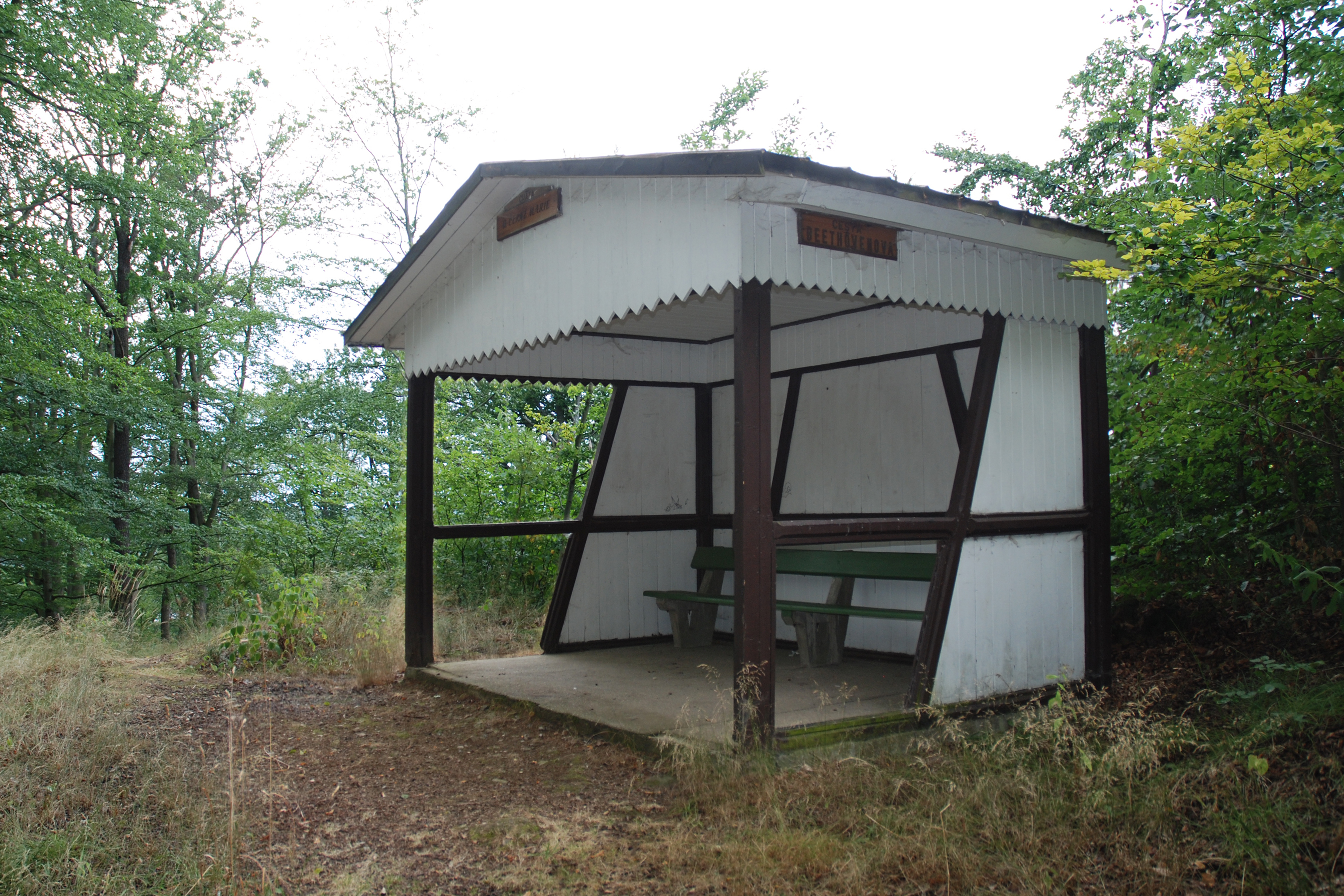 Chata U Černé Marie v lázeňských lesích při Beethovenově stezce